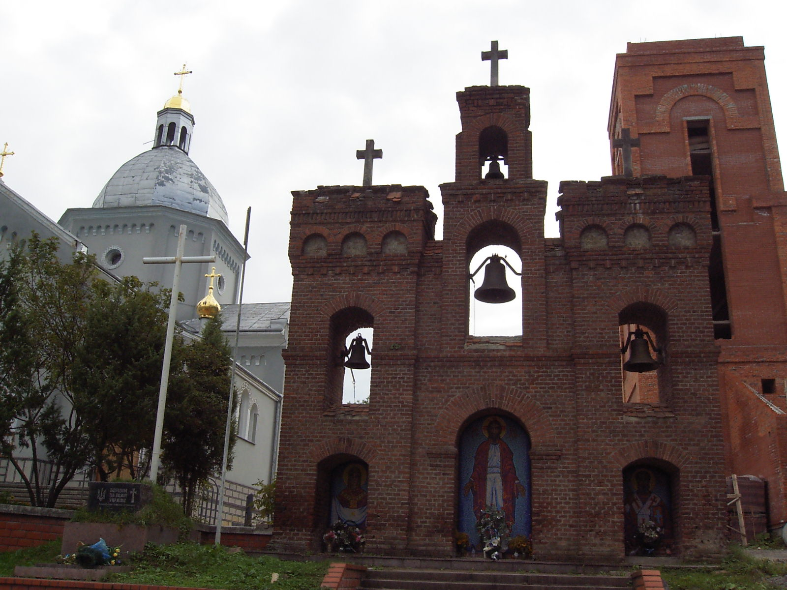 Трускавець меморіал